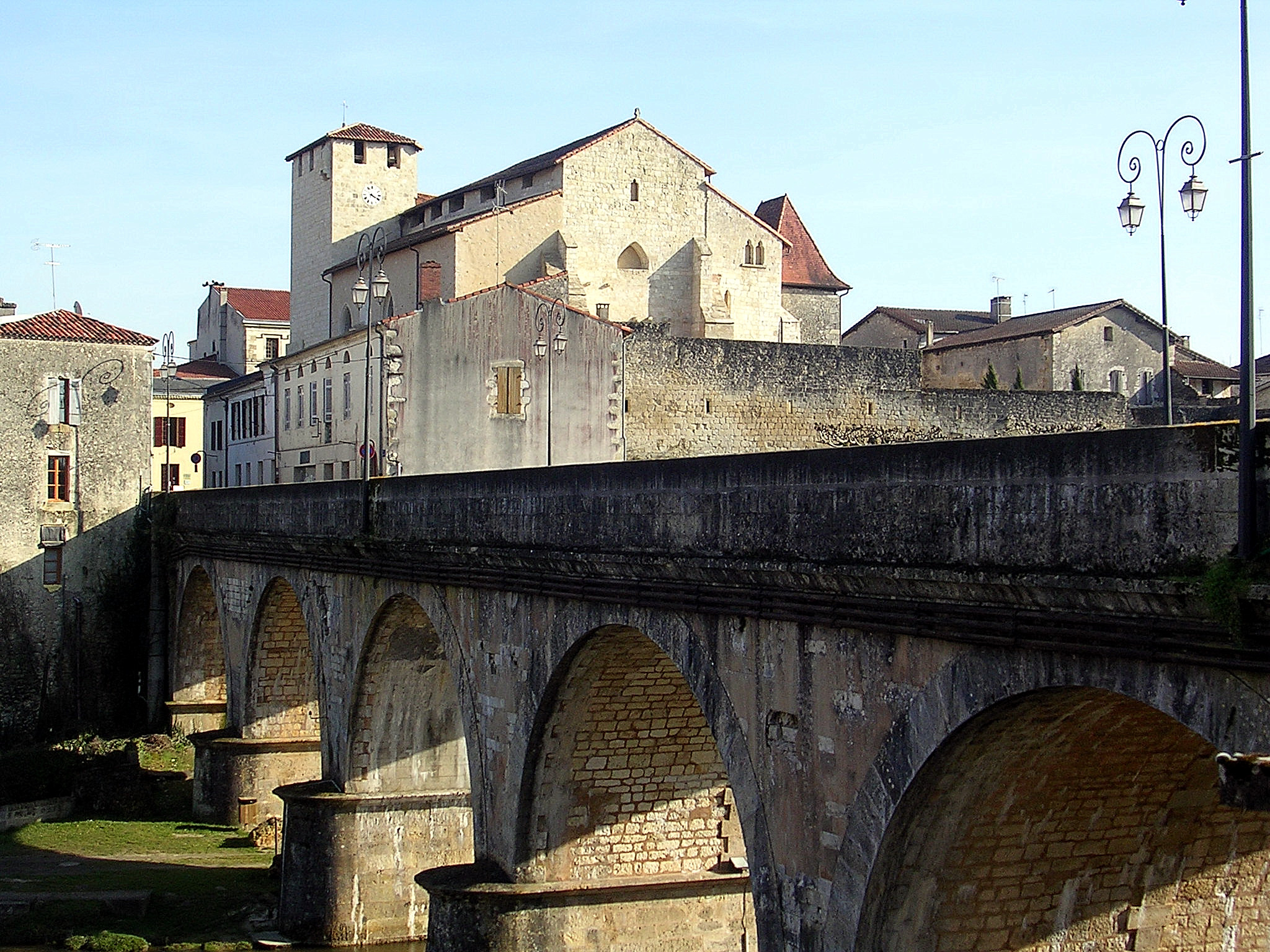 Notre-Dame de l'Assomption, église du XIIe siècle de Roquefort, dans le département français des Landes. Le pont enjambe la Douze.